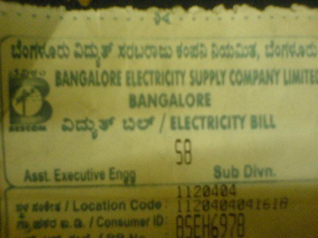 ബാംഗ്ലൂരിലെ ഇലക്ട്രിസിറ്റിന്റെ ബില്ലിന്റെ മുൻഭാഗം